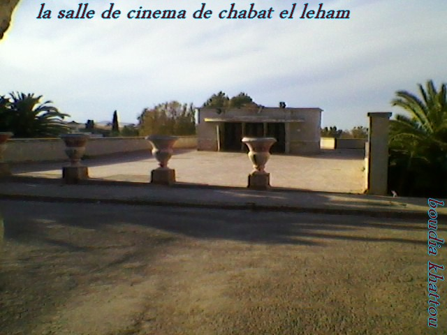 salle de fete